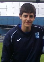 Thibaut Courtois speelde kampioen bij KRC Genk in het seizoen 2010-2011, vertrok uiteindelijk in de zomer van 2011 voor 9 miljoen € naar Chelsea FC, dat hem nu uitleent aan Atletico Madrid.